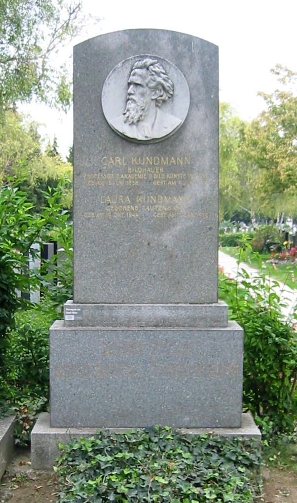 Wiener Zentralfriedhof, Ehrengrab von Carl Kundmann. Relief von Josef Valentin Kassin